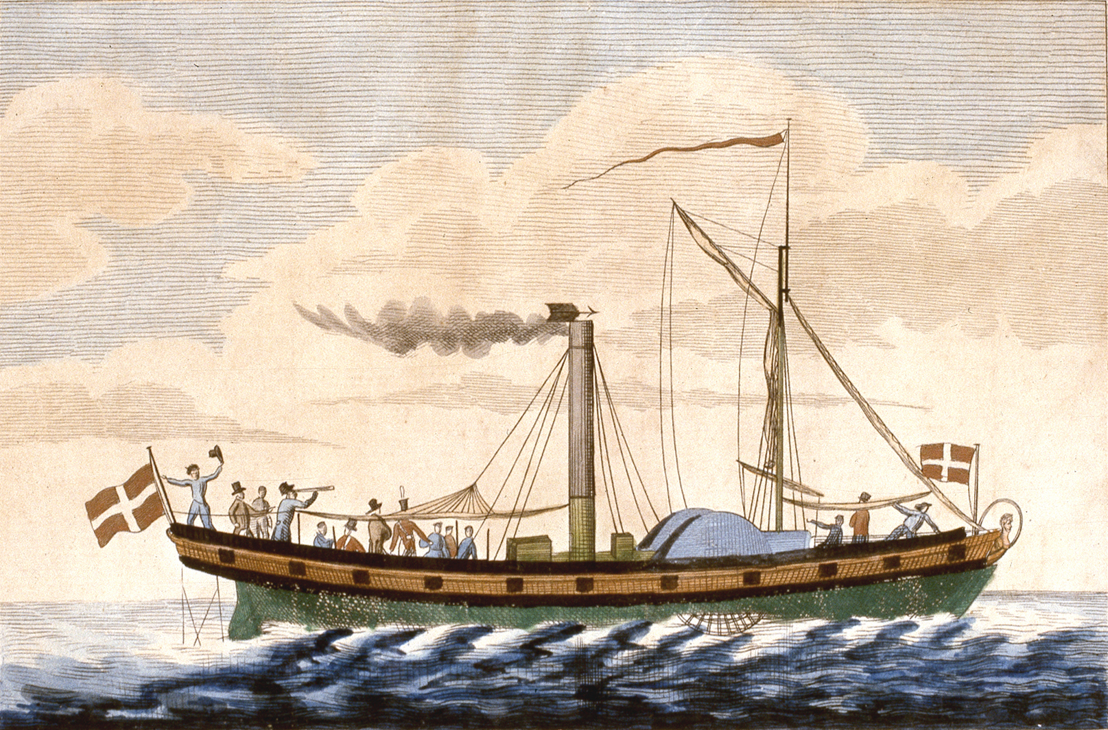 fra: "Vort folk i det nittendeaarhundrede", 1897 udgivet af Vilhelm Østergaard